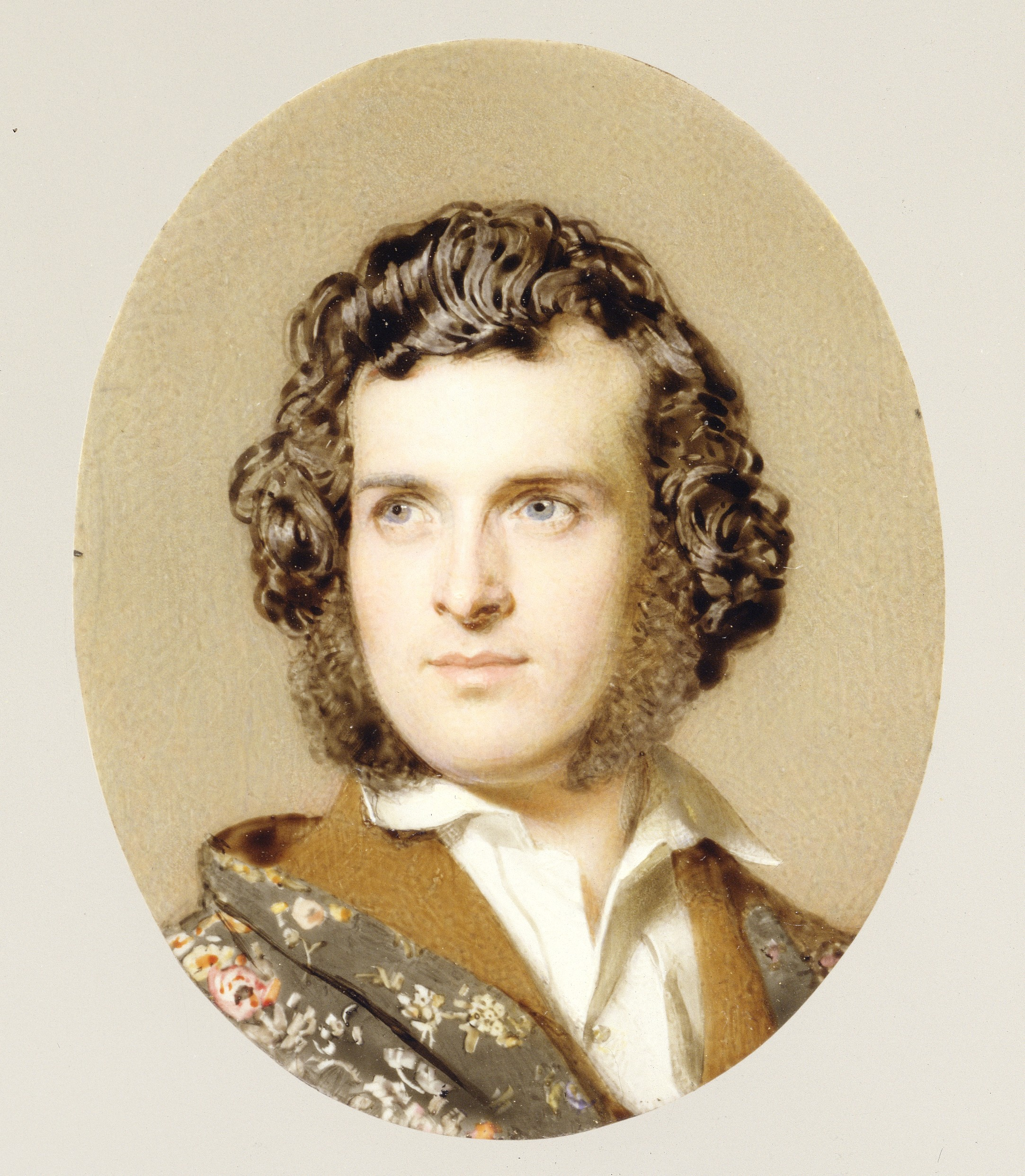 Self-portrait